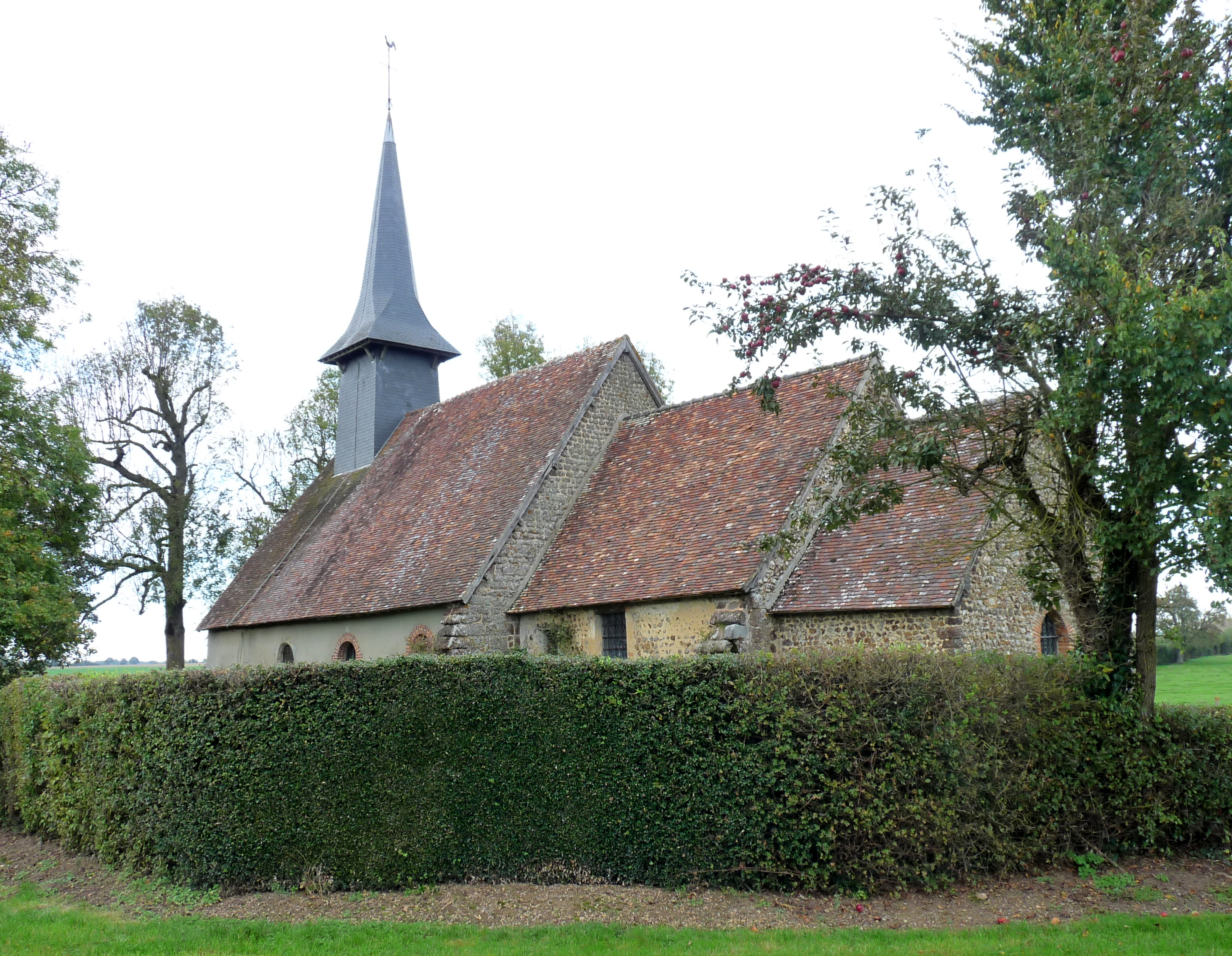 Église Saint-Pierre de la Selle